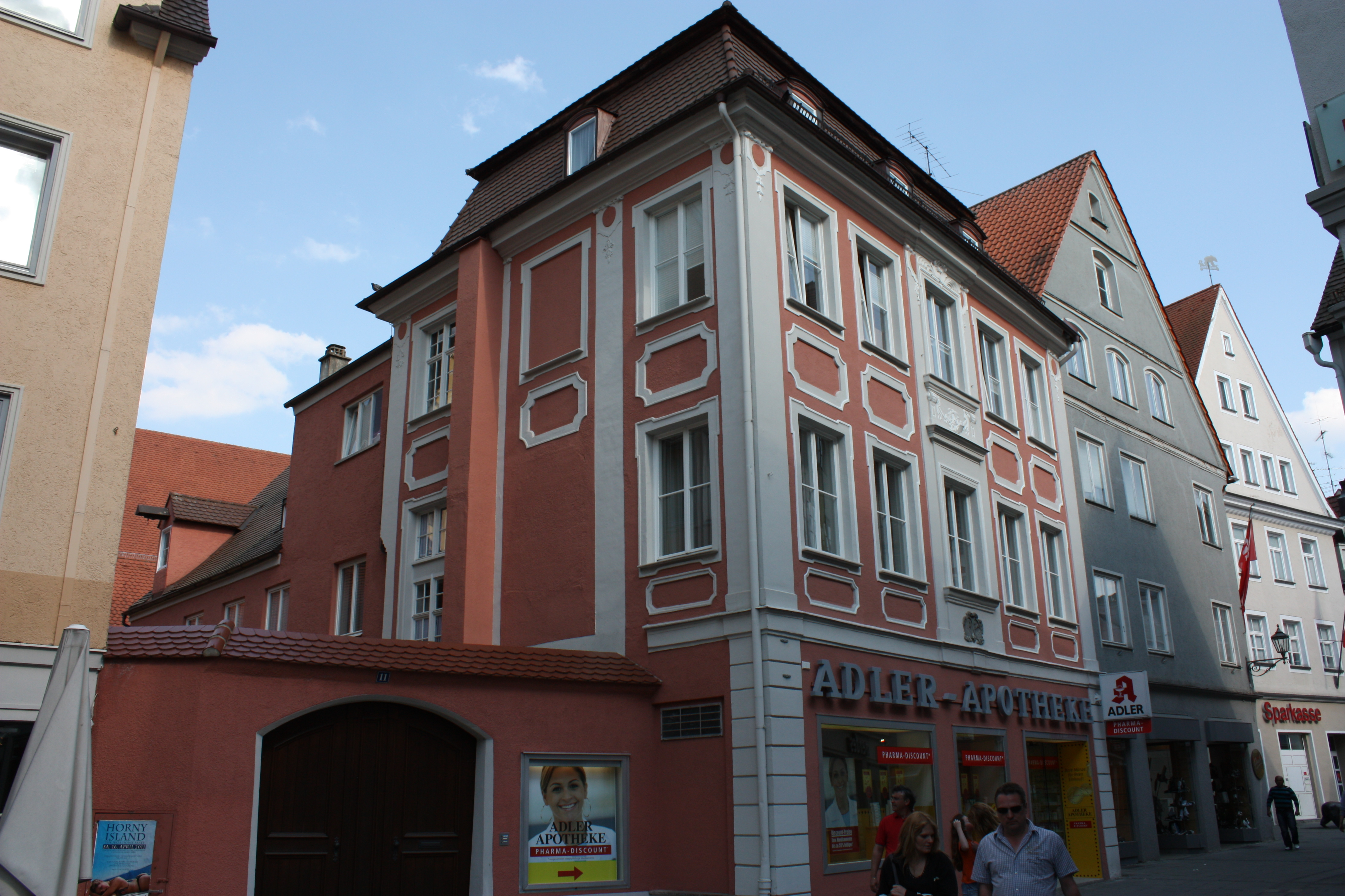 Hausfassade in der Kramerstraße im oberschwäbischen Memmingen. Fußgängerzone der Stadt und ehemalige Bundesstraße 19.